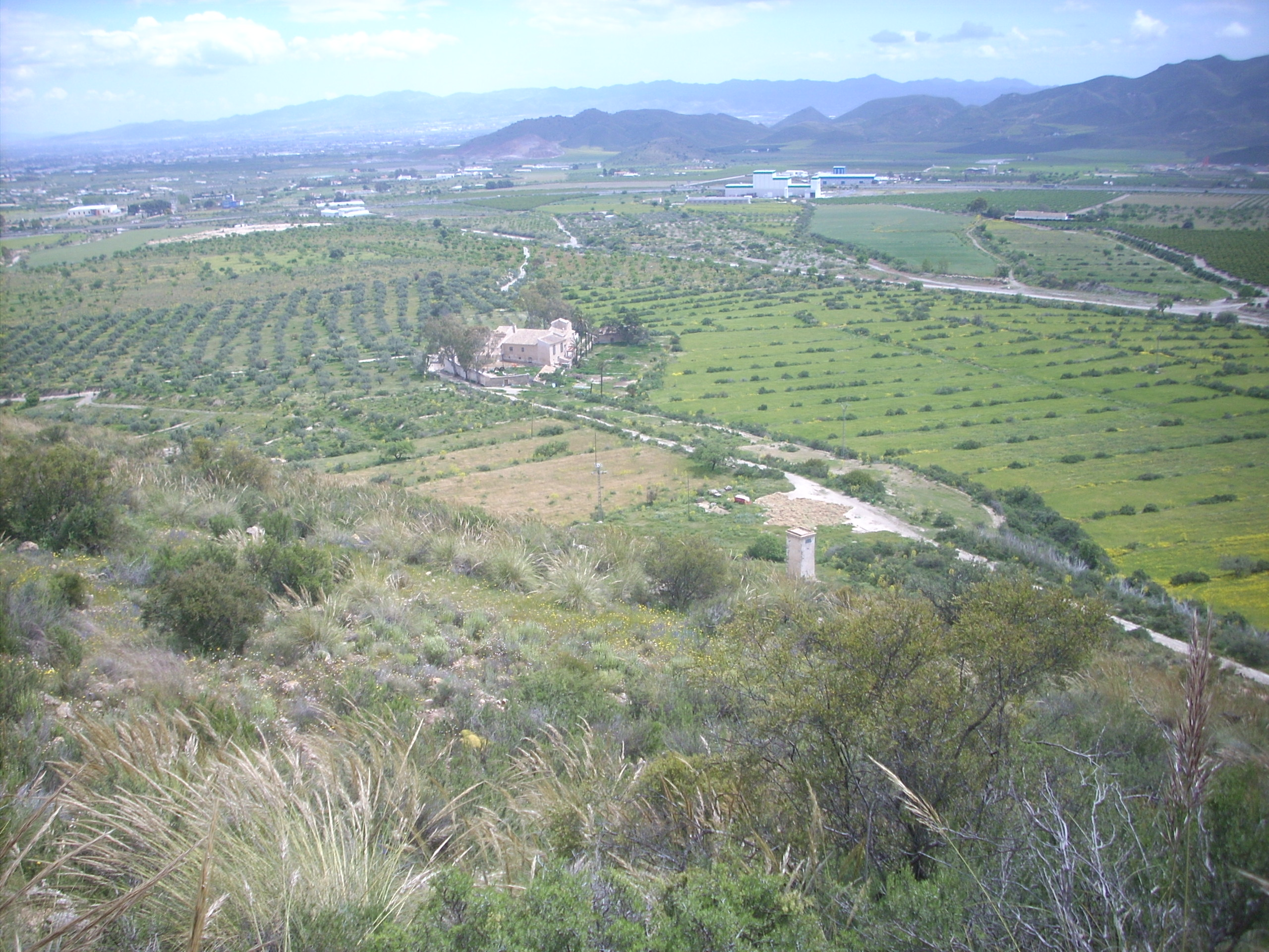 Rambla de Vilerda y Pedanía Puerto Adentro